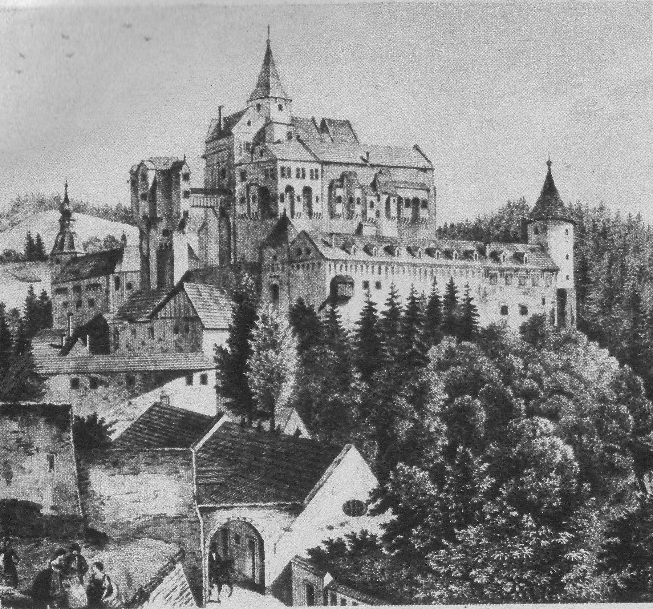 Rytina Pernštejna z třicátých let 19. století, jejímž autorem je Adolph Kunike.